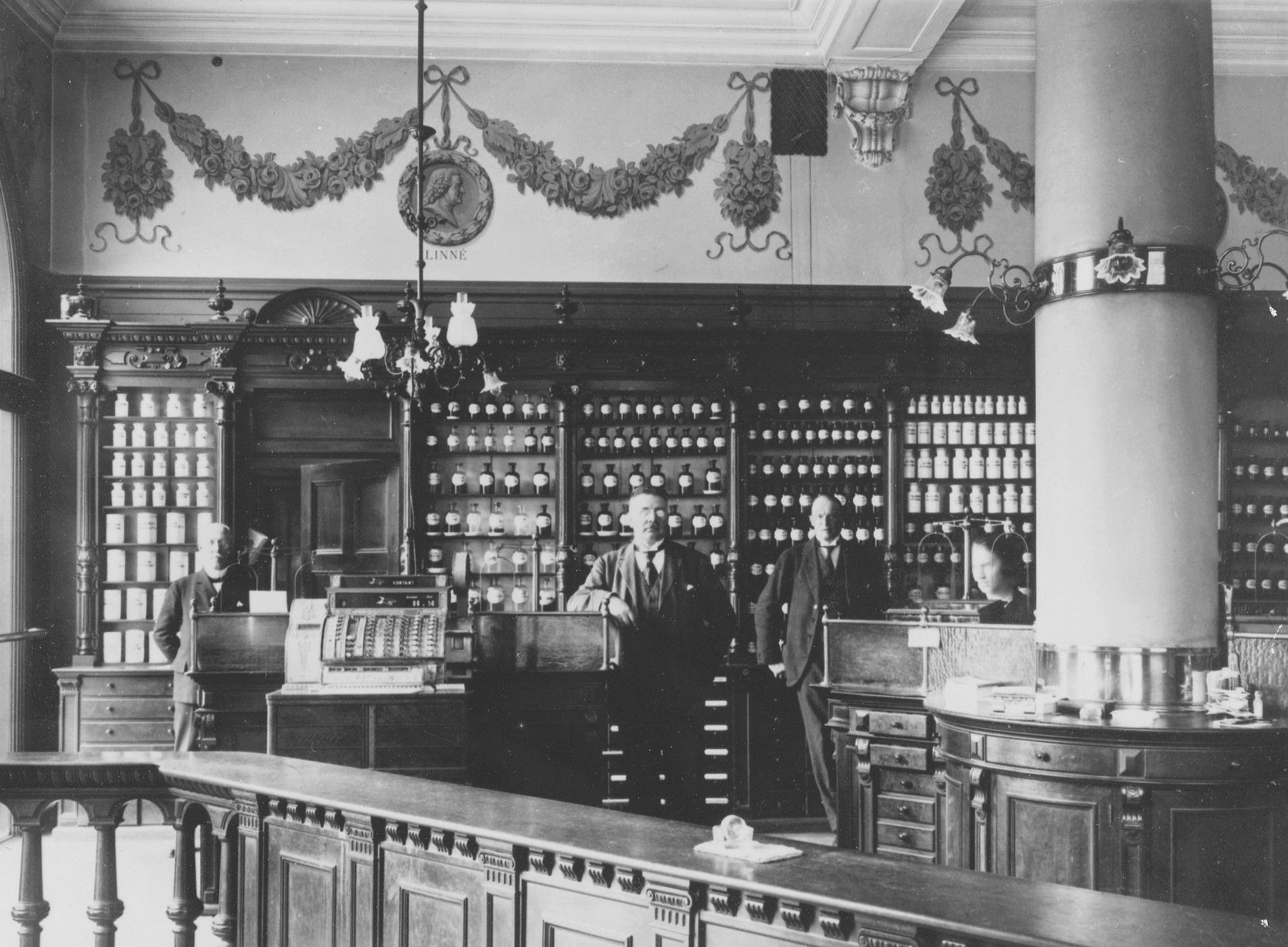 Interiör Apoteket Enhörningen, Hornsgatan 29